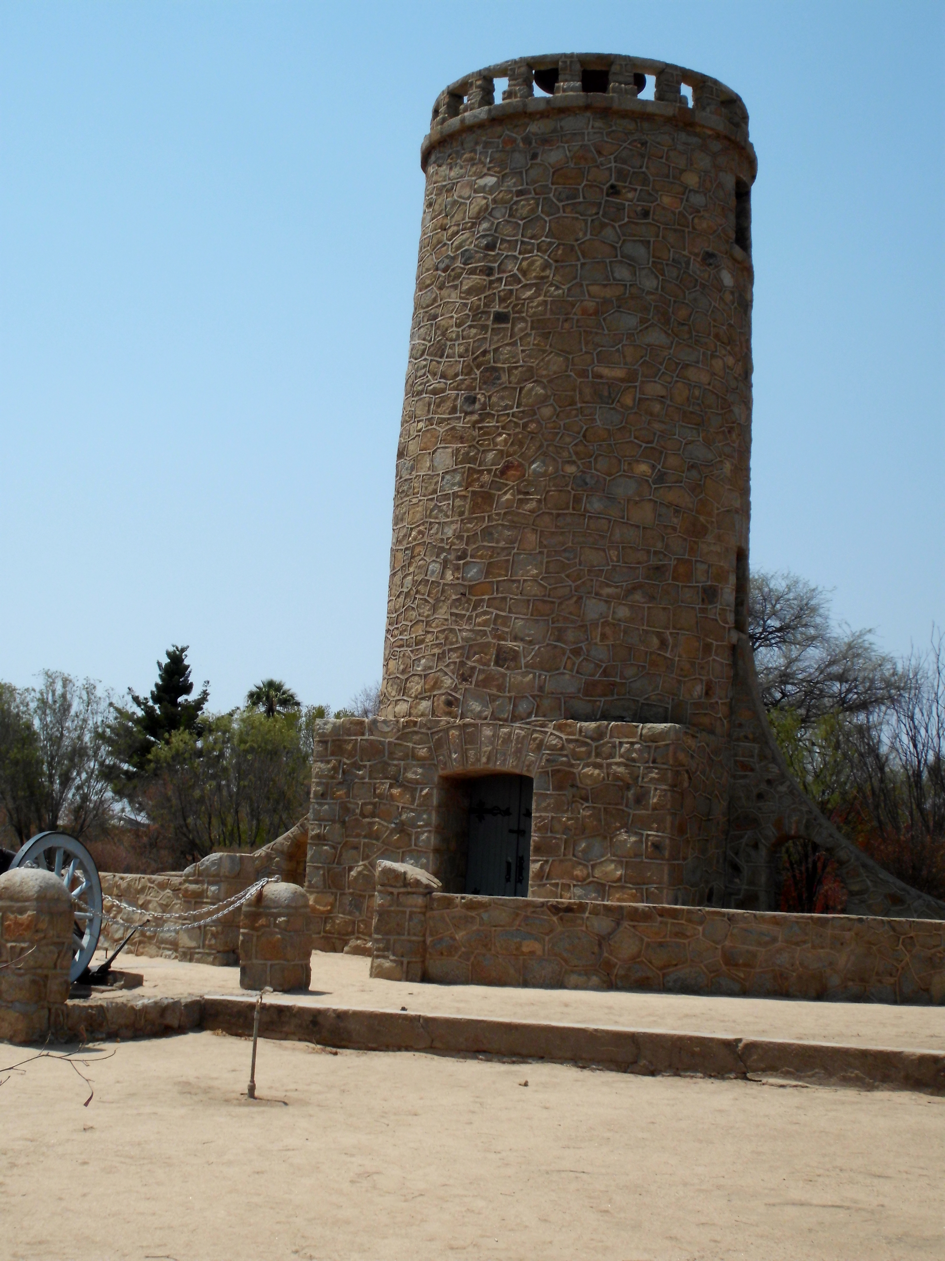 Franke-Turm in Omaruru, 1908